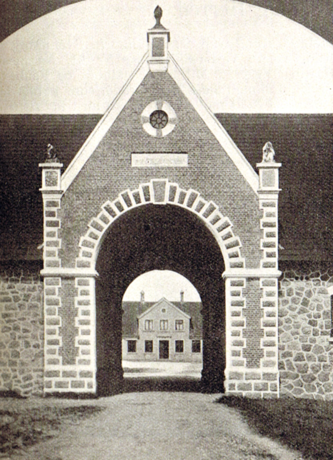 Flintholm Omtrent midtvejs mellem Svendborg og Faaborg ligger den gammle adelige sædegård Flintholm. Gården nævnes første gang i 1505 og ligger i Hundstrup Sogn, Sallinge Herred, Egebjerg Kommune. Hovedbygningen er opført i 1843-1844.